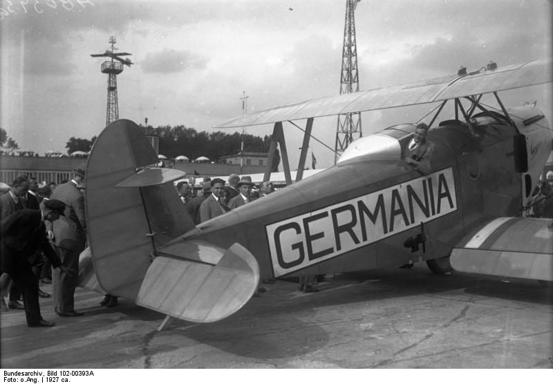 Zwischenlandung des Ozeanfliegers Könnecke in Berlin vor seinem grossen Flug über den Ozean mit der Casparmaschine "Germania".